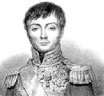 Général_Jean_Baptiste_Juvénal_Corbineau